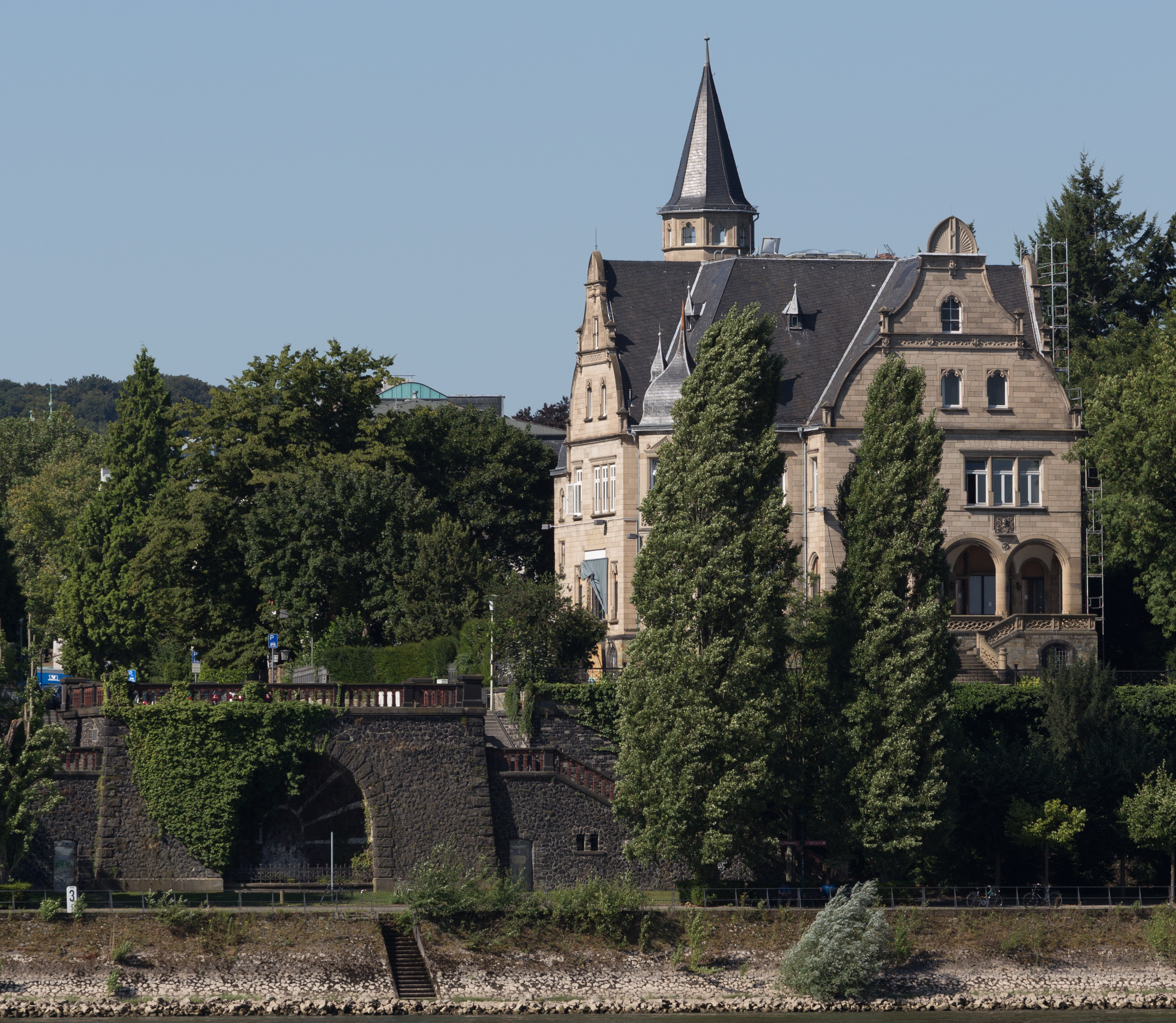 Villa Spiritus, Kaiser-Friedrich-Straße 19, Bonn: Rheinseite